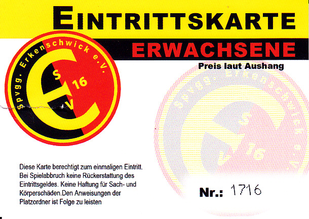 Eintrittskarte